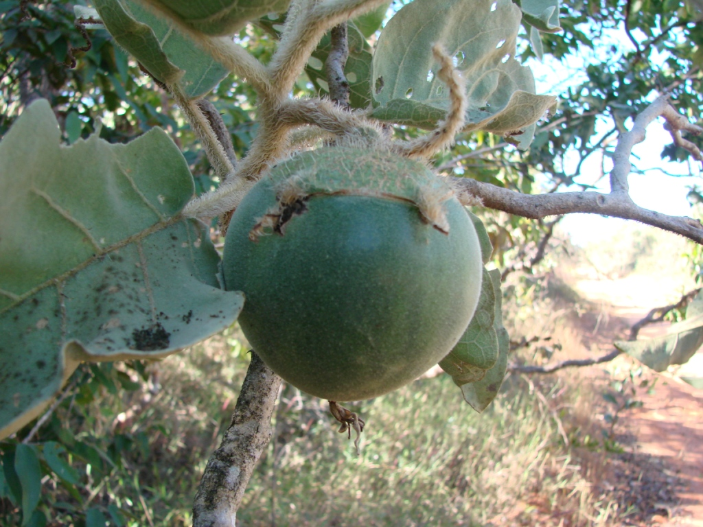 Solanum lycocarpum - SOLANACEAE - Jardim Botânico de Brasília - DF - Brasil